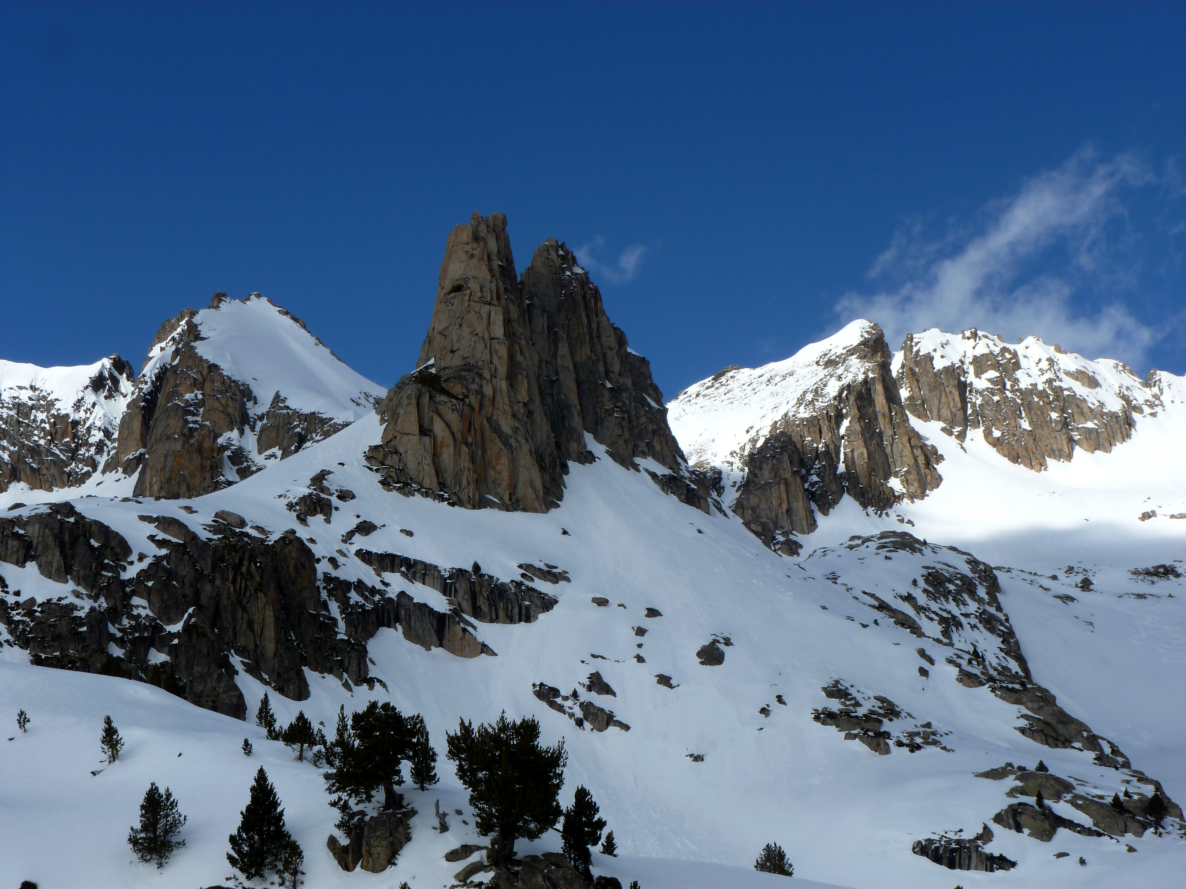 Aigüestortes, Agulles d'Amitges This is a a photo of a natural area in Catalonia, Spain, with id: ES510081